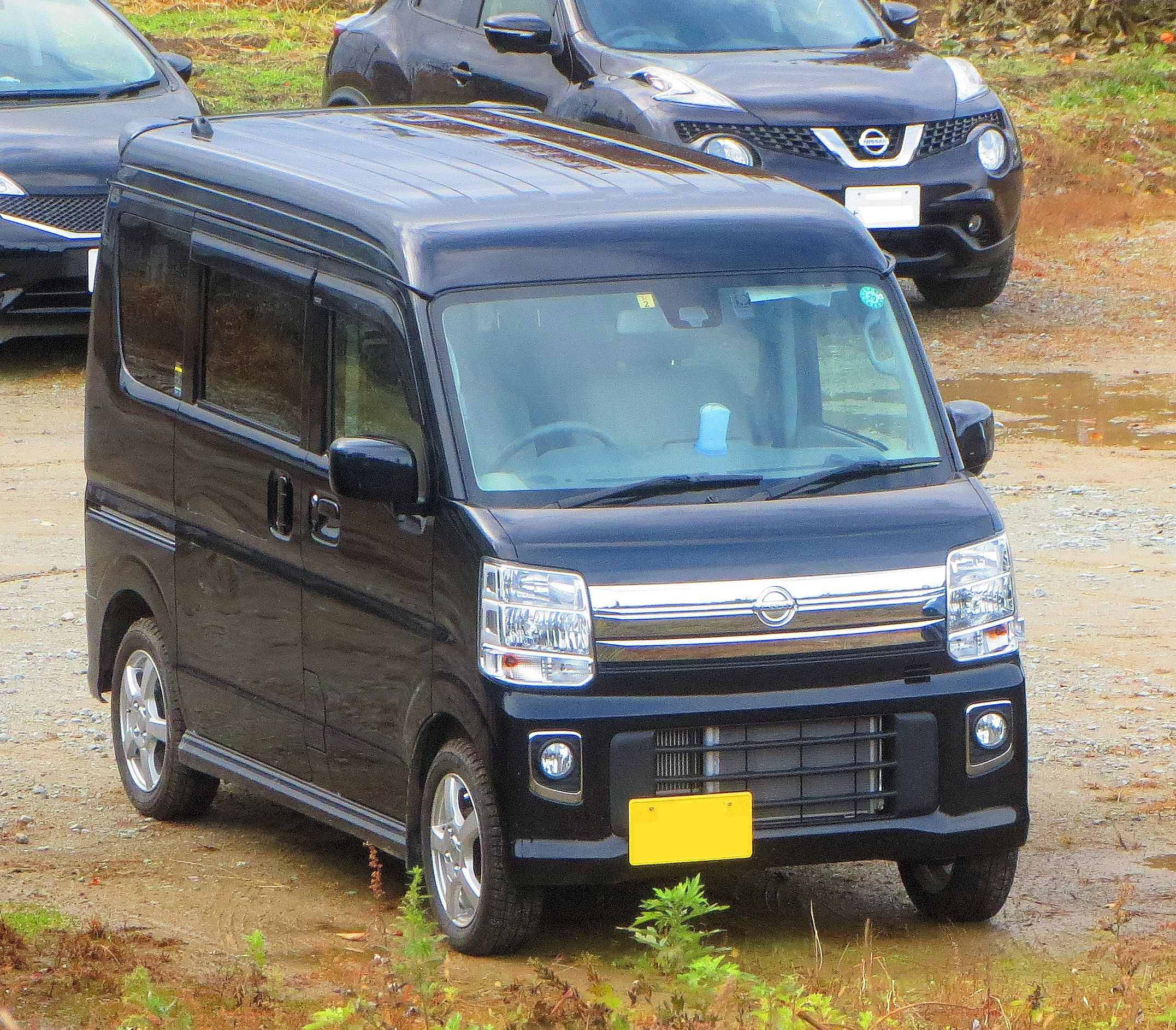 日産 NV100クリッパー リオ E ハイルーフ4WD